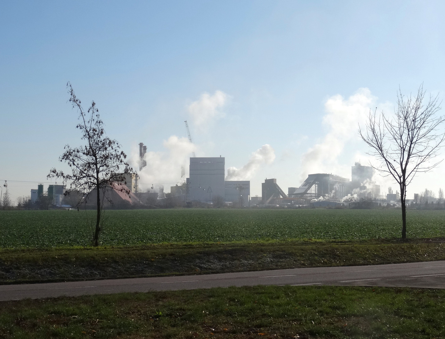 Janikowskie Zakłady Sodowe "Janikosoda" w Janikowie, w składzie Ciech Soda Polska S.A.